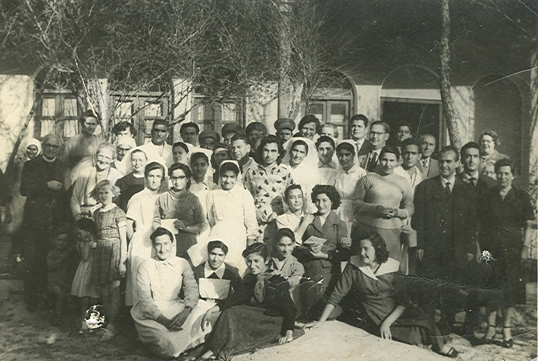 فرتور یادگاری از پرستاران بیمارستان مسیح